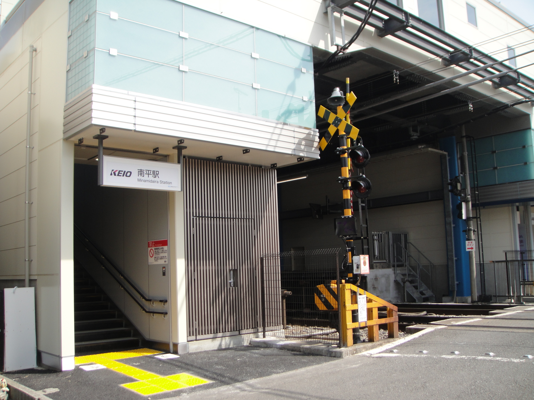 南平駅 新駅舎南口